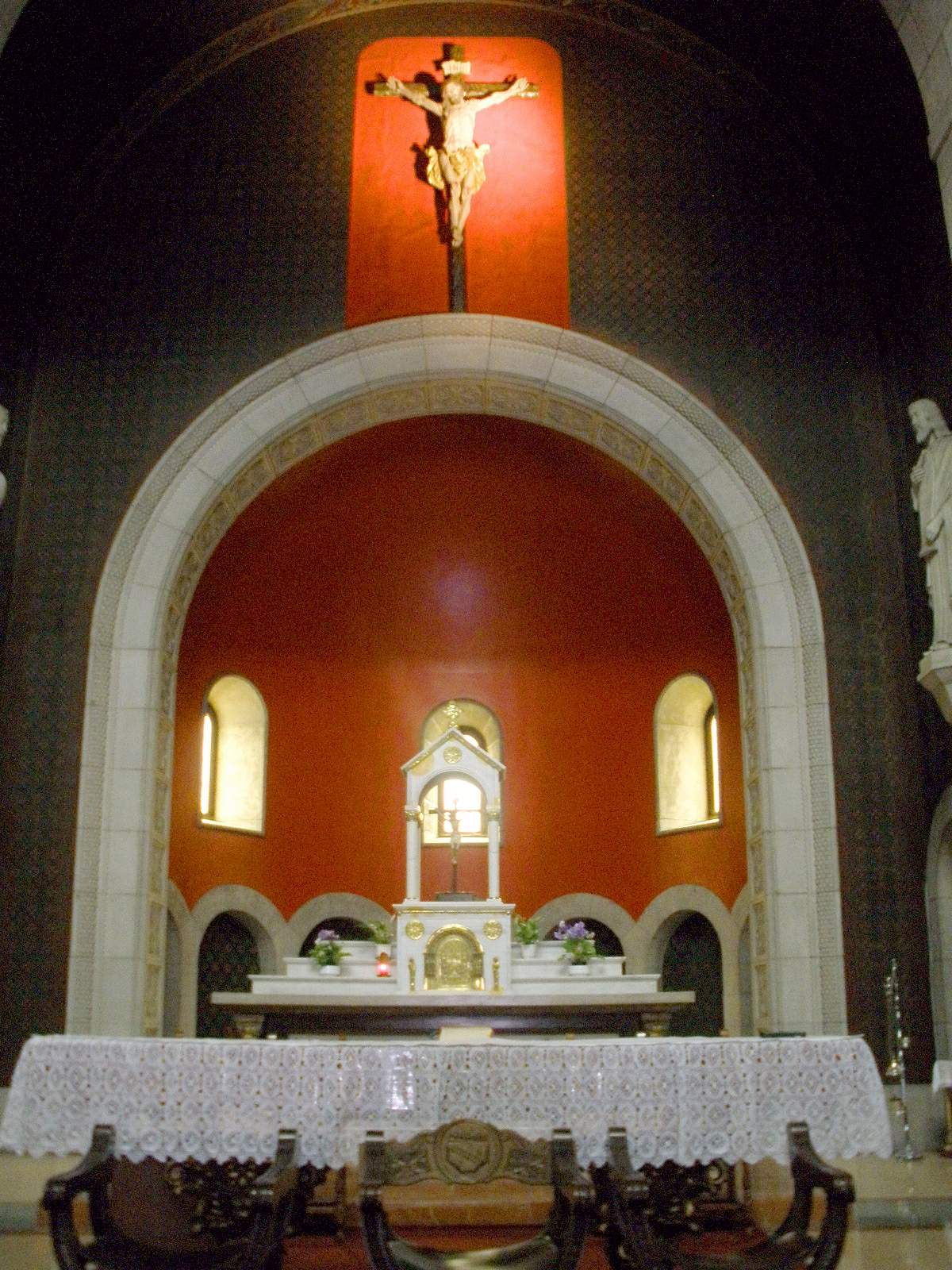 El Entrego (San Martín del Rey Aurelio) - Iglesia de San Andres